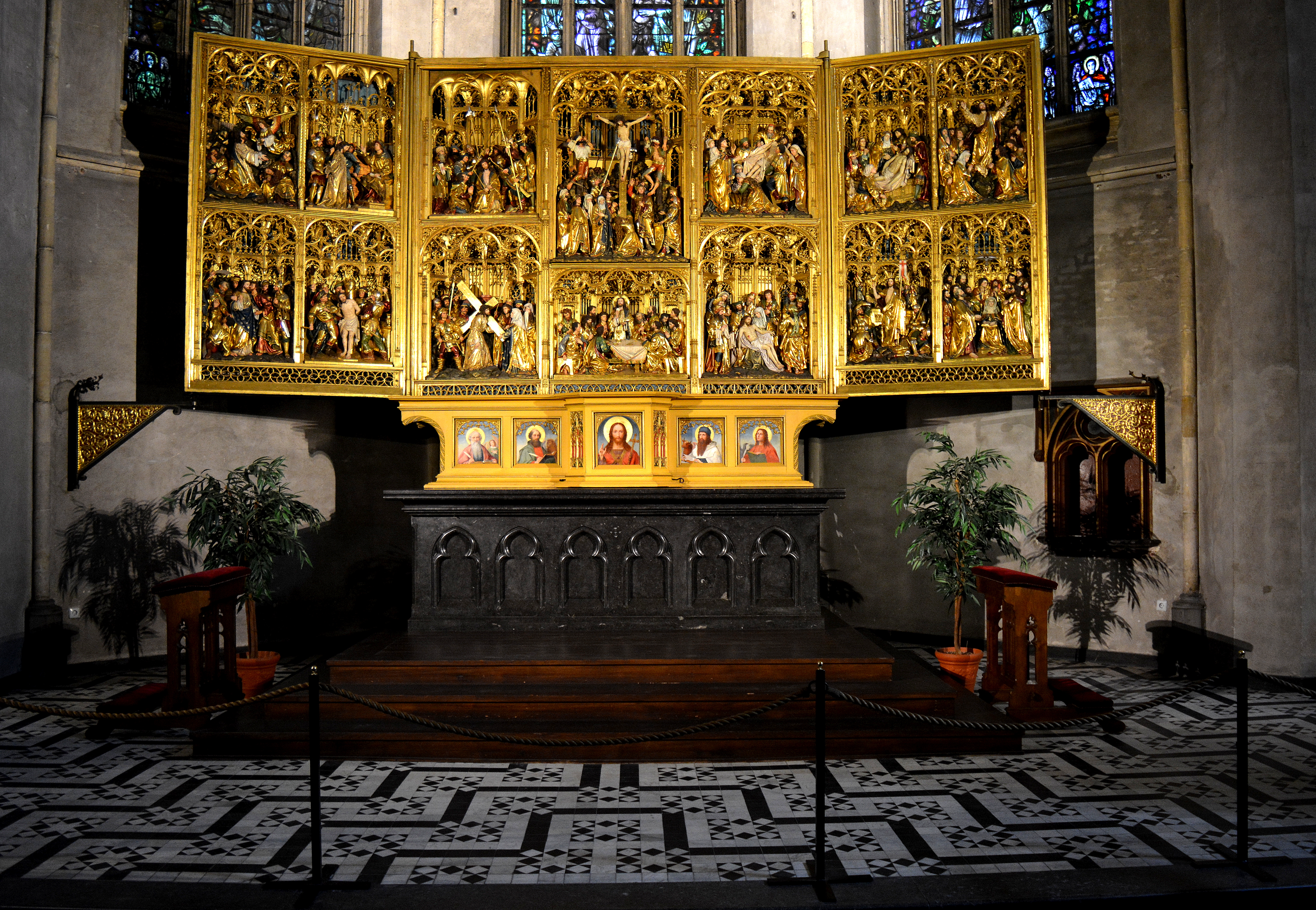 Venlo, Sint-Martinuskerk, hoofdaltaar